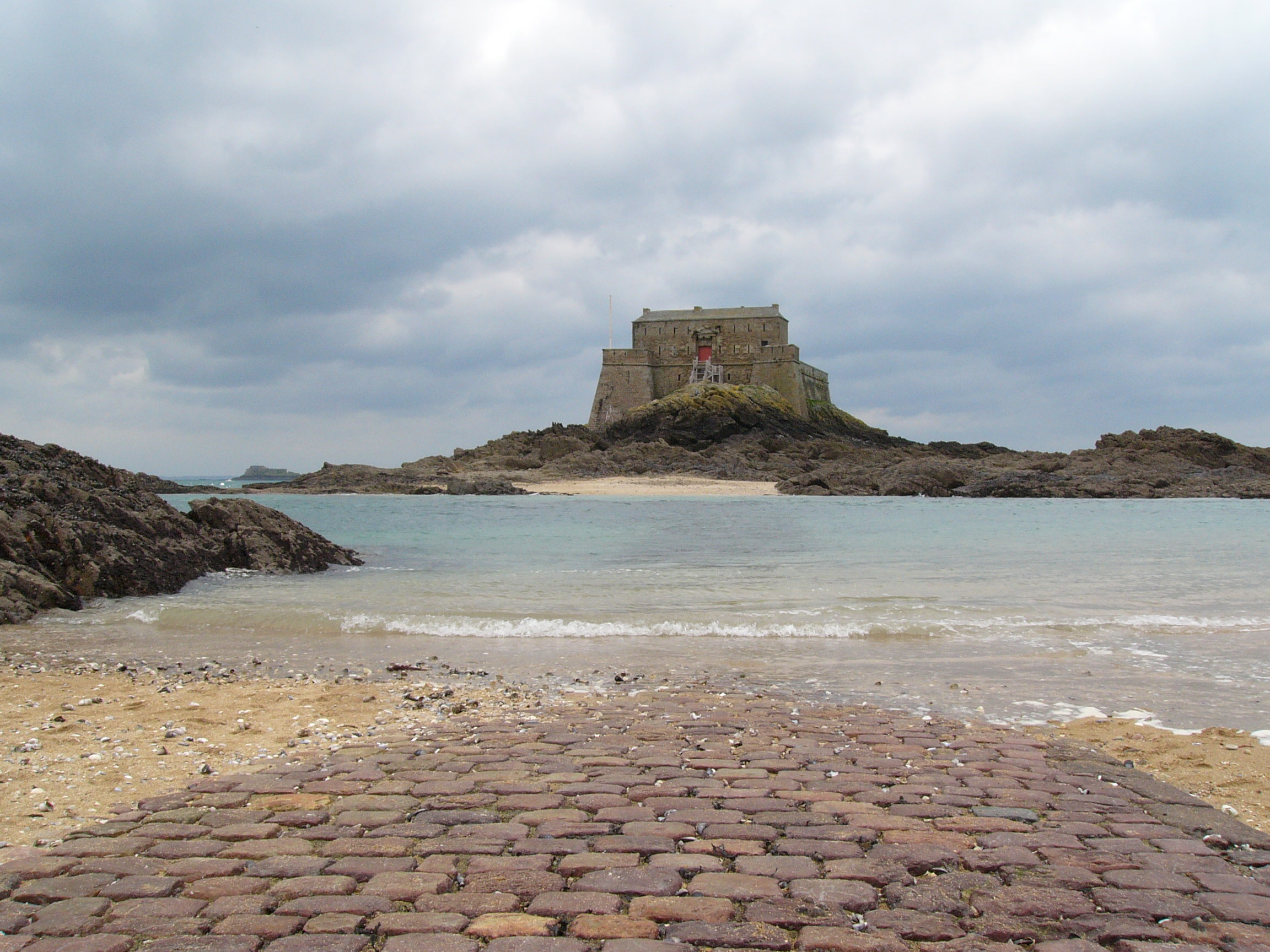 Fort du Petit Bé, Saint-Malo, à marée basse vu du Grand Bé Petit Bé castle, Saint-Malo, low tide, seen from Grand Bé island